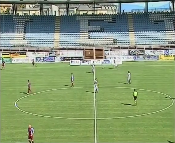 Partita di calcio Rieti-Avezzano, terminata 1-2, del campionato di serie D (girone G) disputata il 26 marzo 2017 allo stadio Centro d'Italia-Manlio Scopigno di Rieti